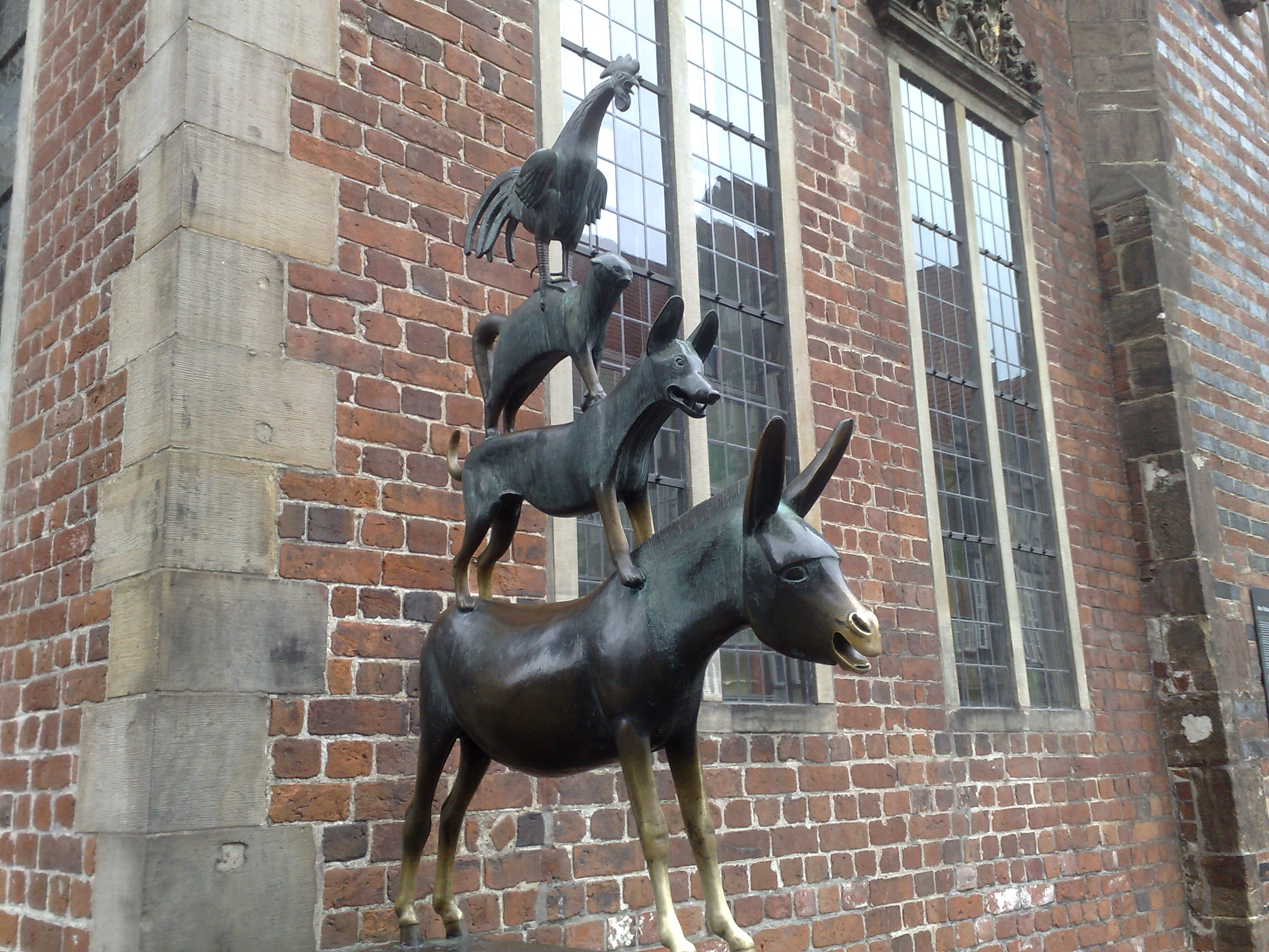 Bremen musicians, Germany